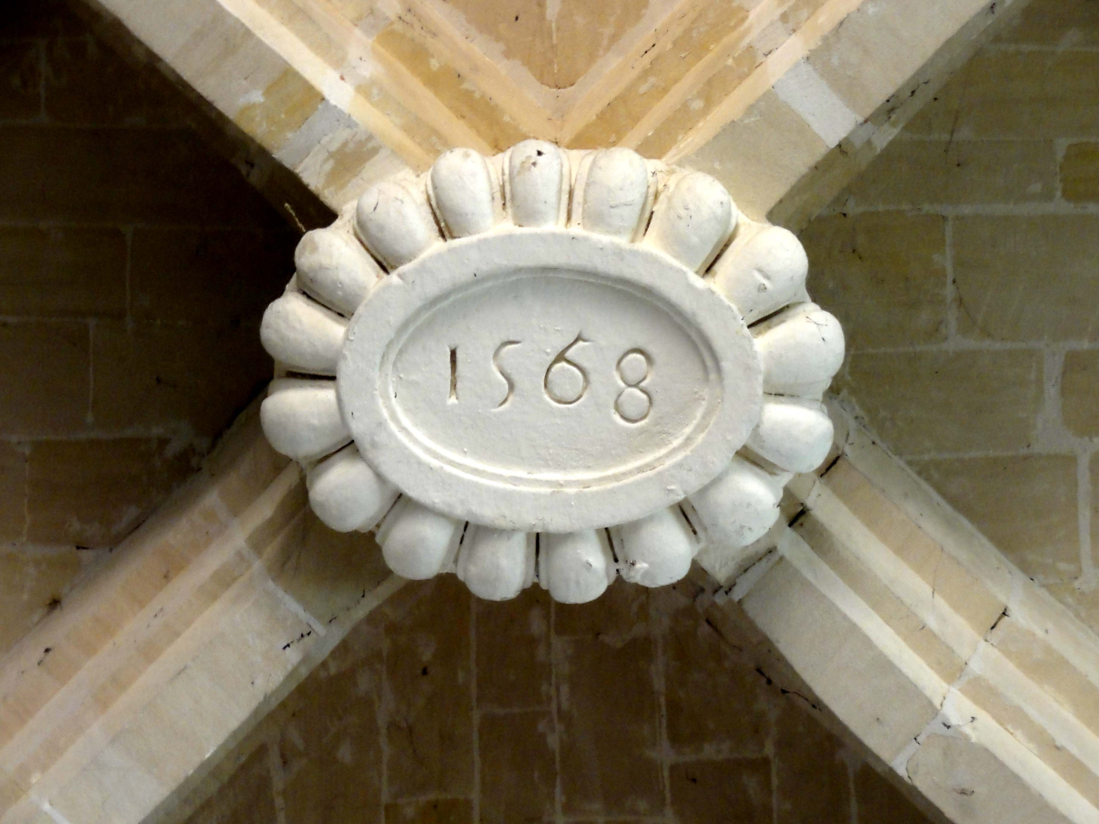 Clé de voûte de l'église (voir titre).